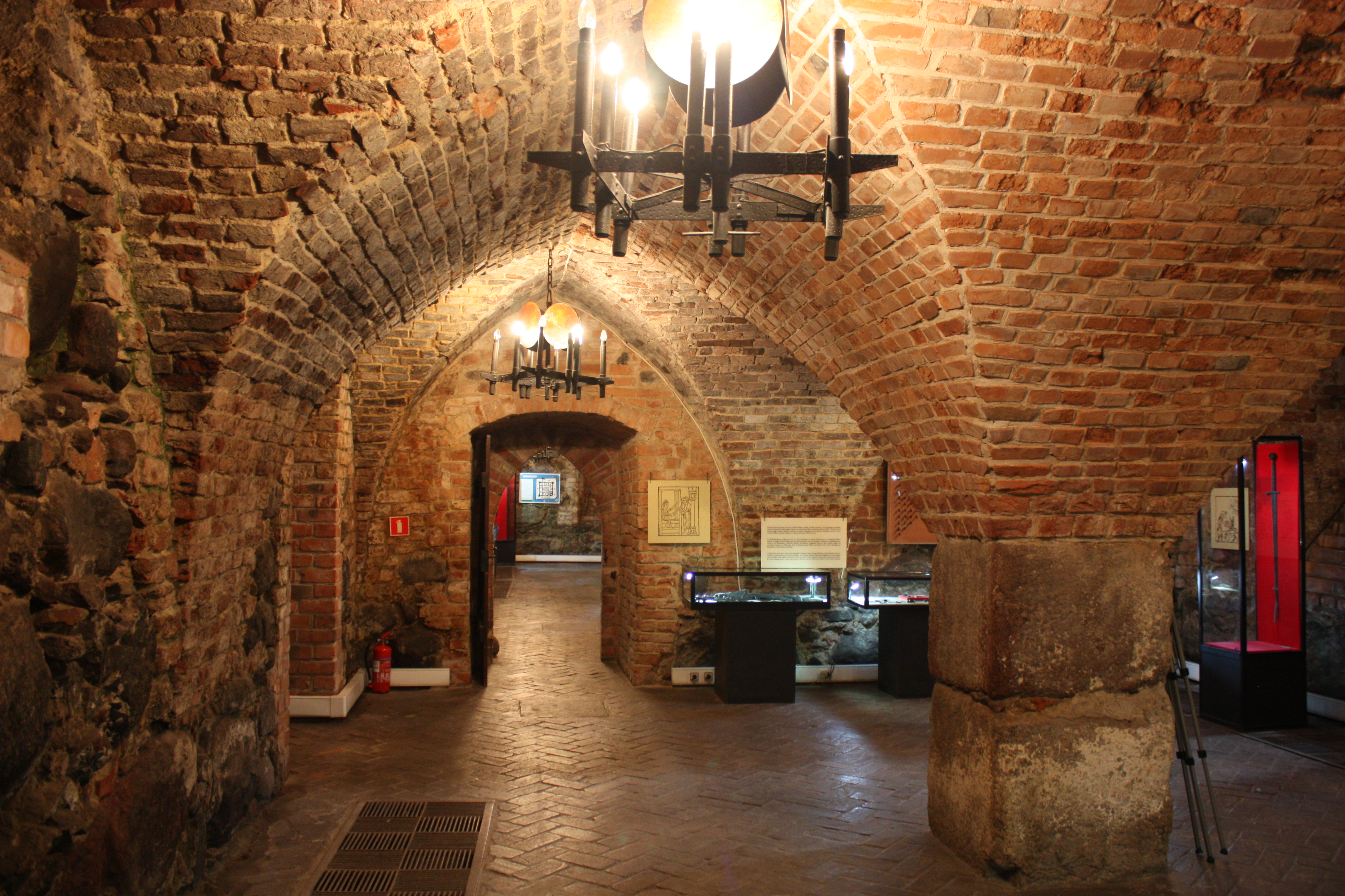 Brodnica, ruiny zamku, pocz. XIV, 1415